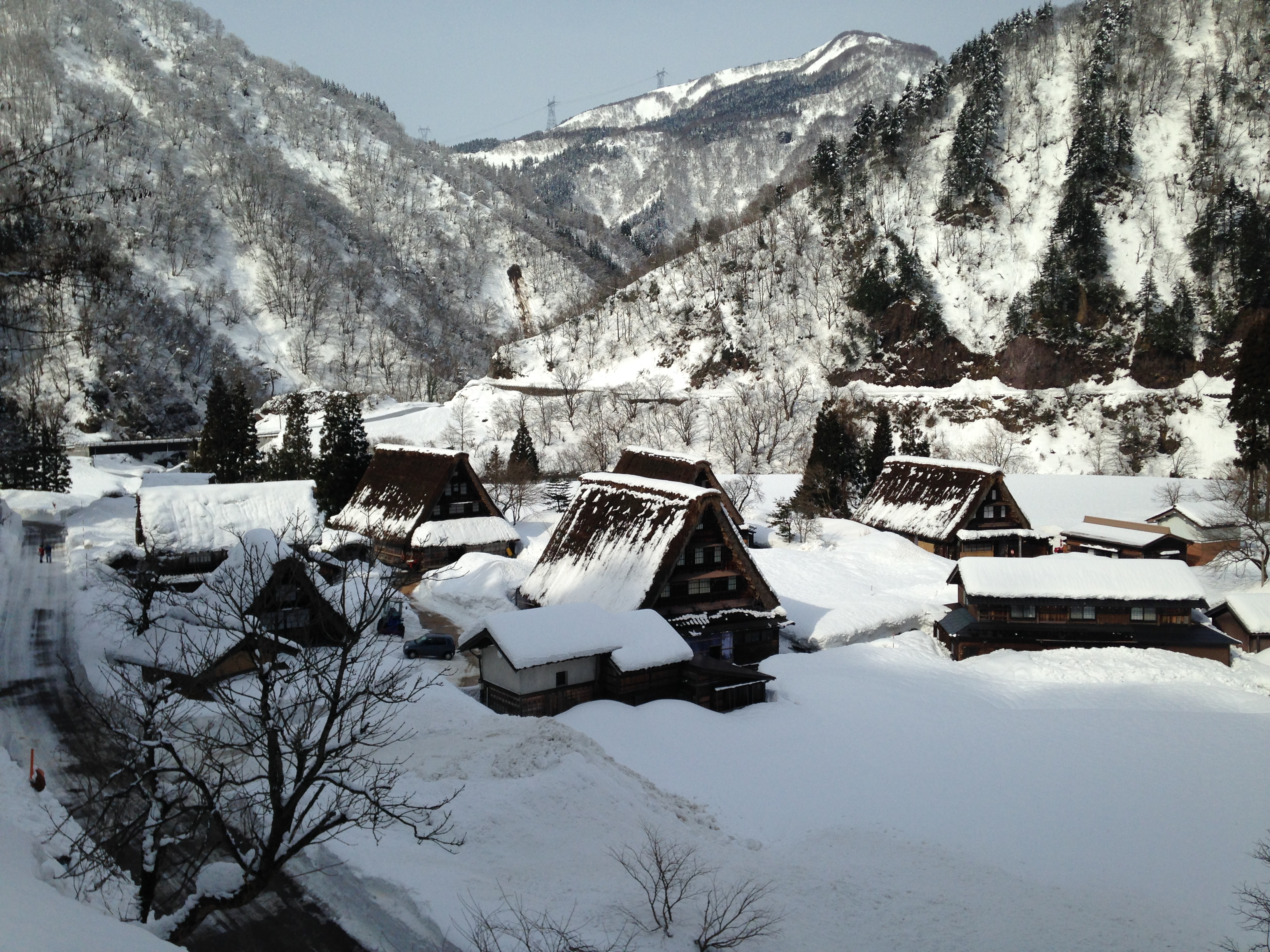 五箇山・菅沼集落の雪景